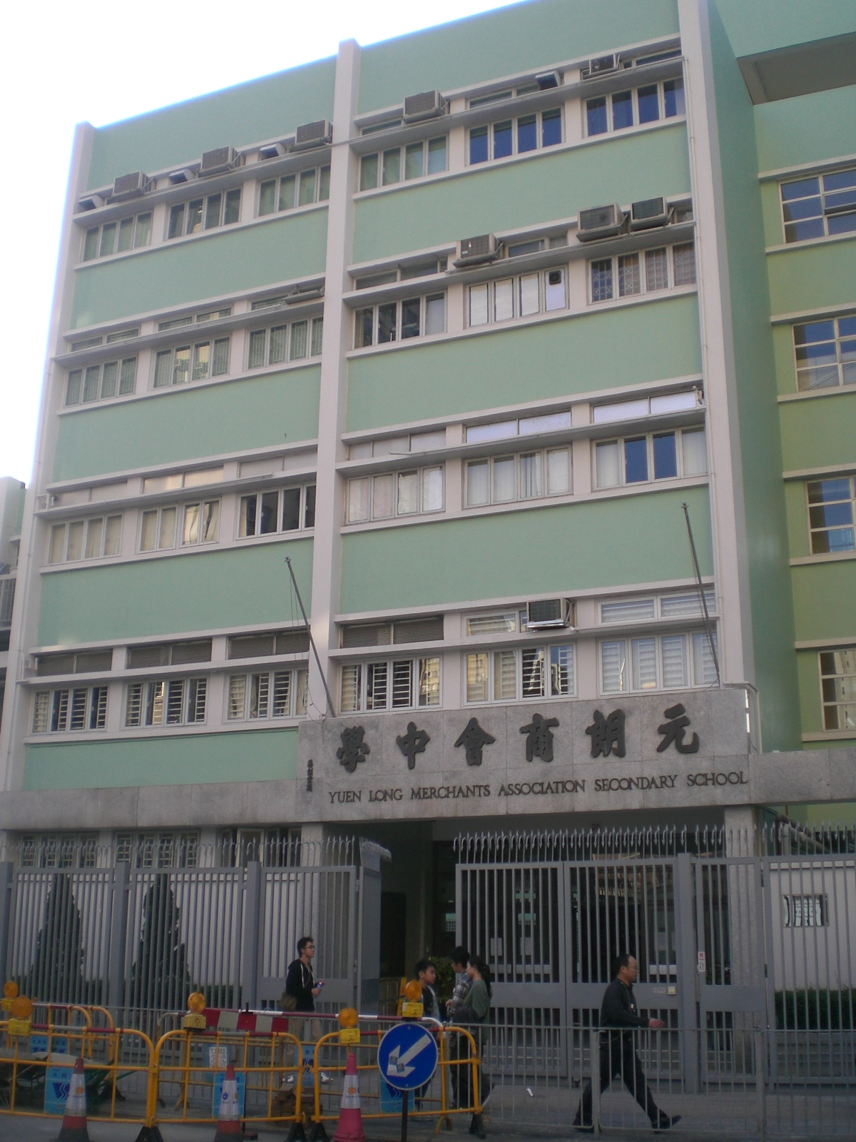 元朗區元朗新市鎮豐年路 元朗商會中學